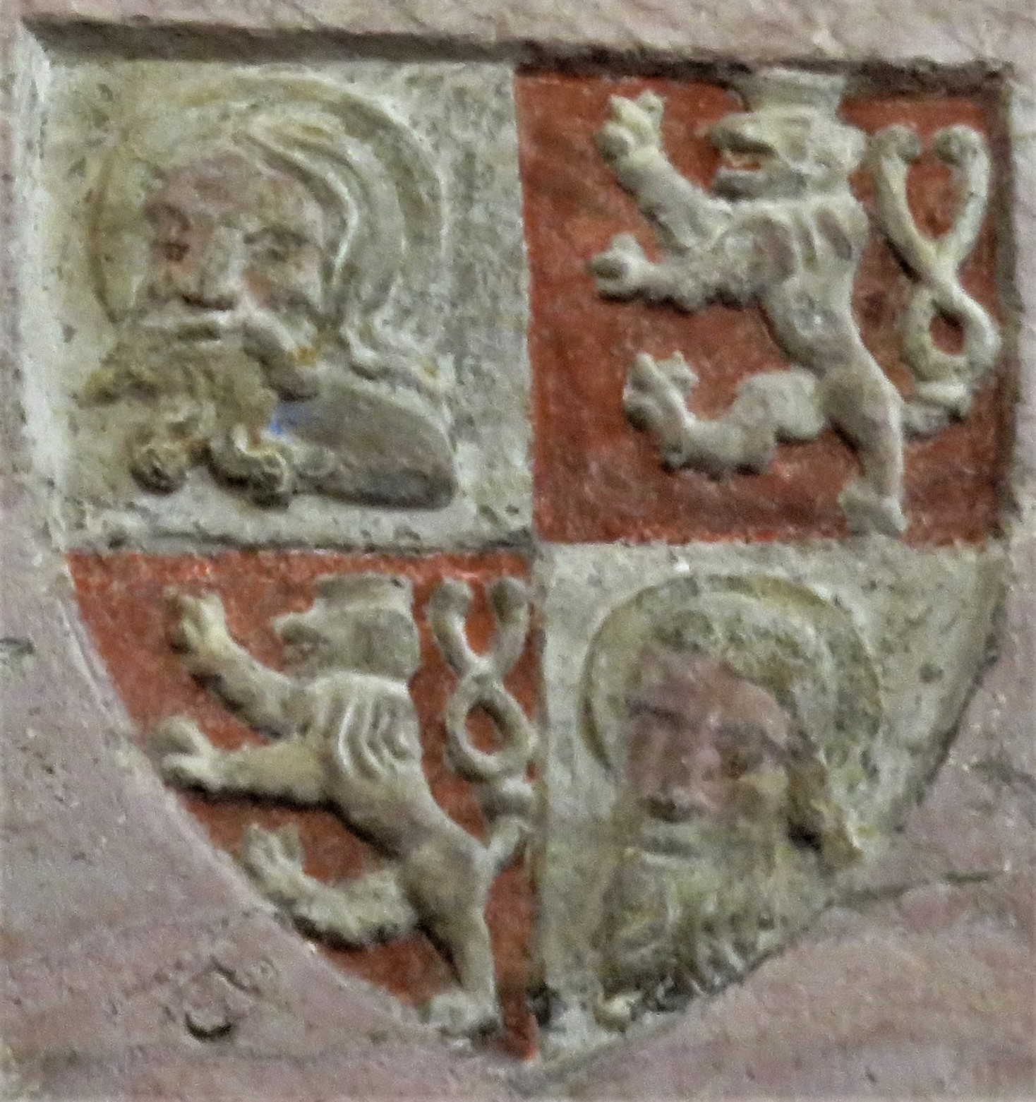 Znak Vratislavi z erbovního sálu na hradě Lauf an der Pegnitz z doby císaře Karla IV. (kolem 1360).